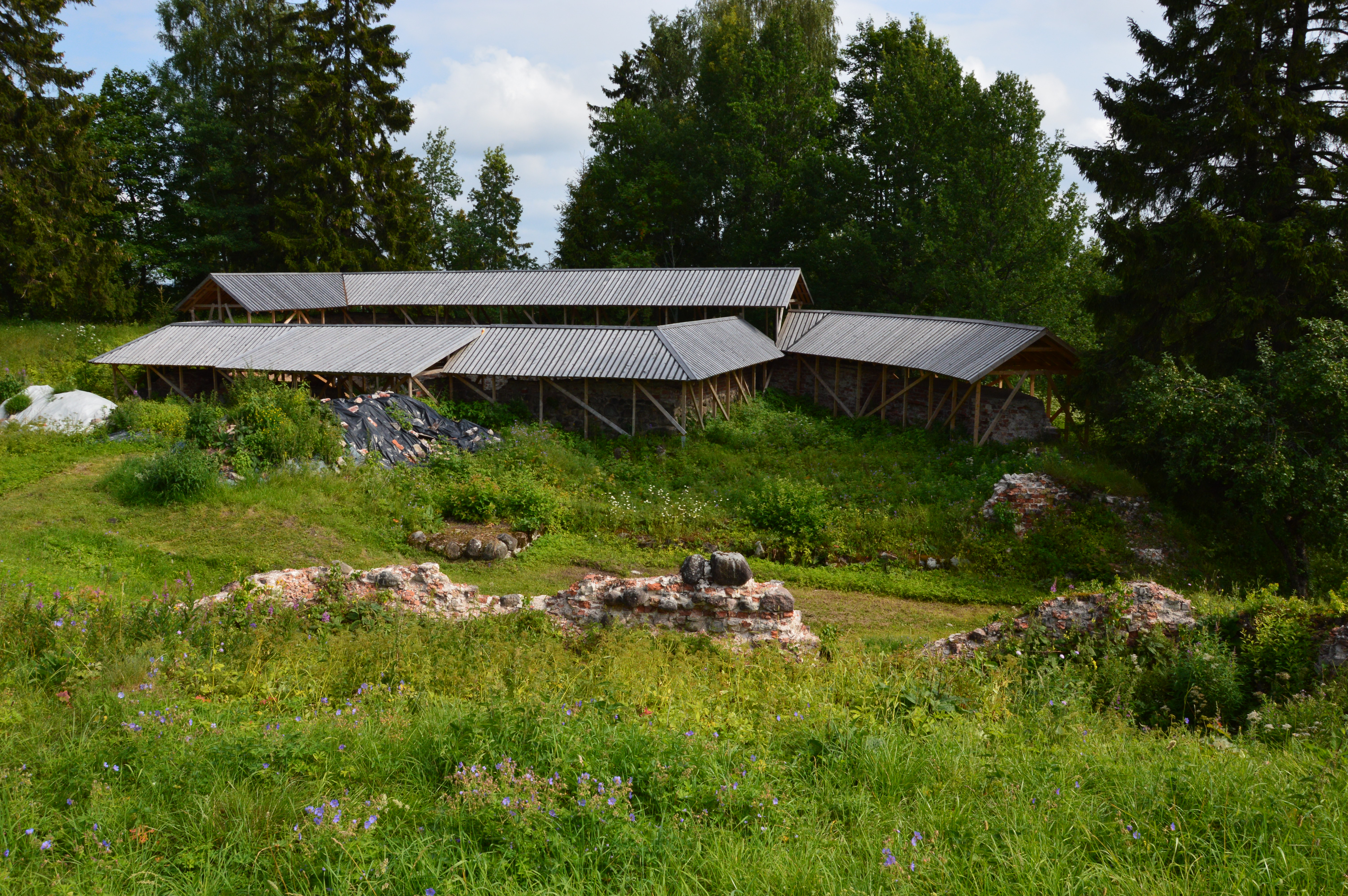 Otepää linnamägi